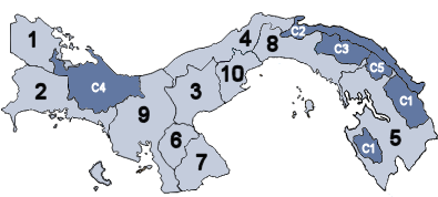 The Provincias and Comarcas of Panamá numbered Bocas del Toro Chiriquí Coclé Colón Darién Herrera Los Santos Panamá Veraguas Panamá Oeste C1 Emberá C2 Kuna Yala C3 Madugandí C4 Ngobe-Buglé C5 Wargandí